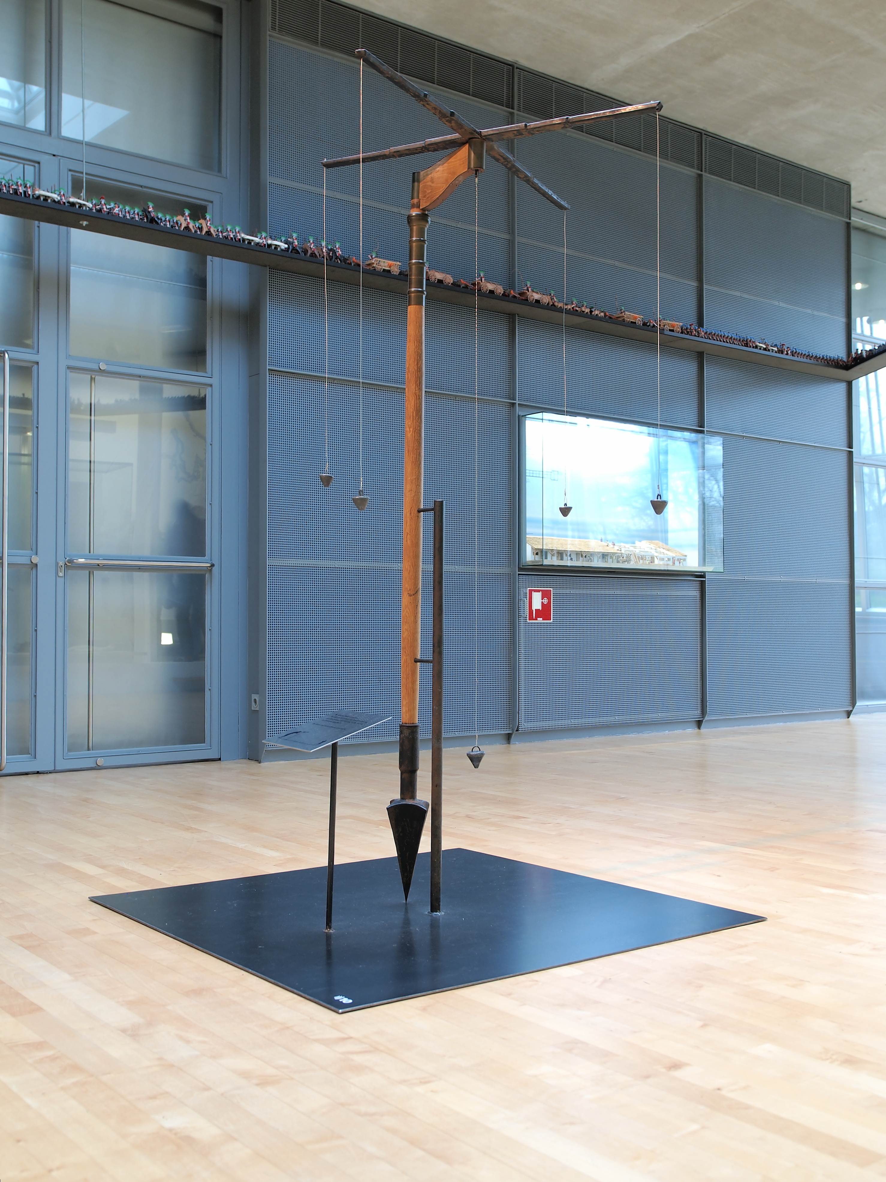 Nachbau einer römischen Groma im LWL-Römermuseum in Haltern am See. Die Groma dient zur Vermessung von Grundstücken und Konstruktionen von rechten Winkeln durch ihre lotrechten Visierlinien